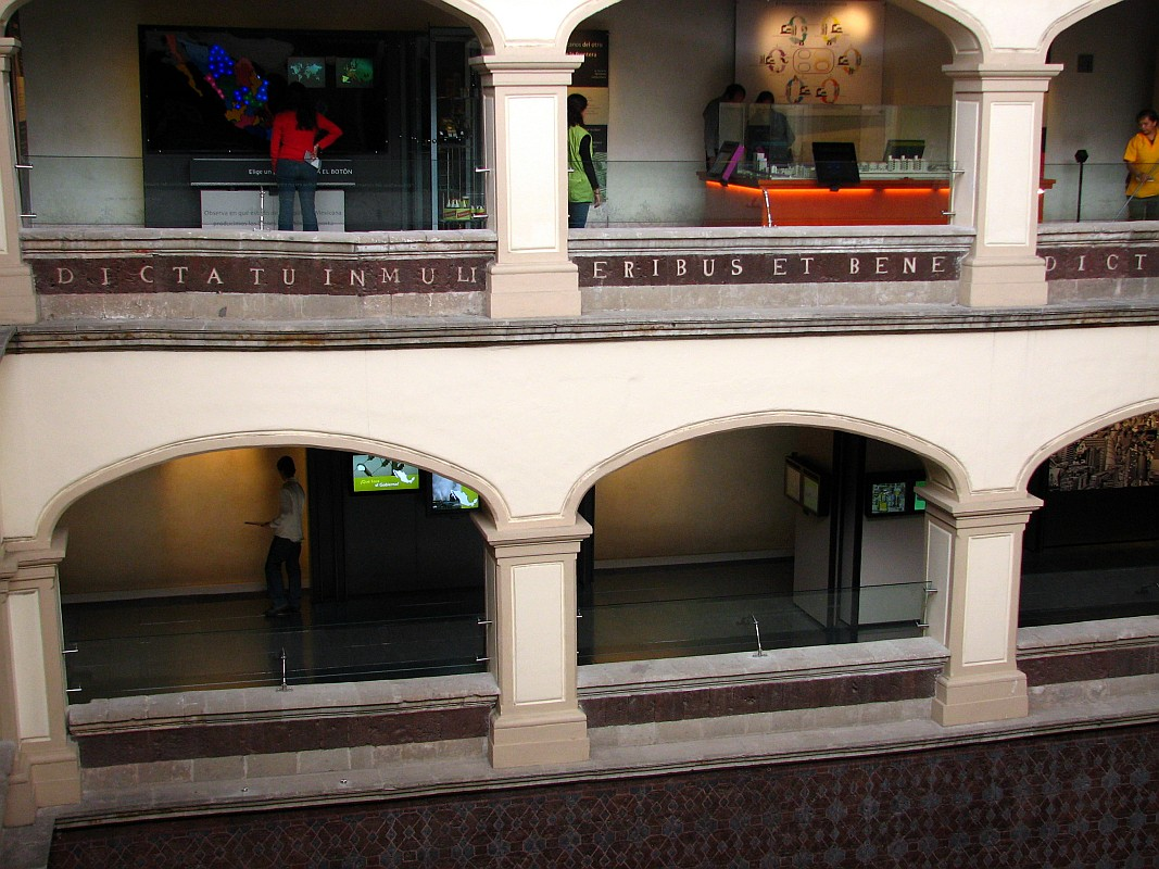 Vista de algunas de las salas del Museo Interactivo de Economía